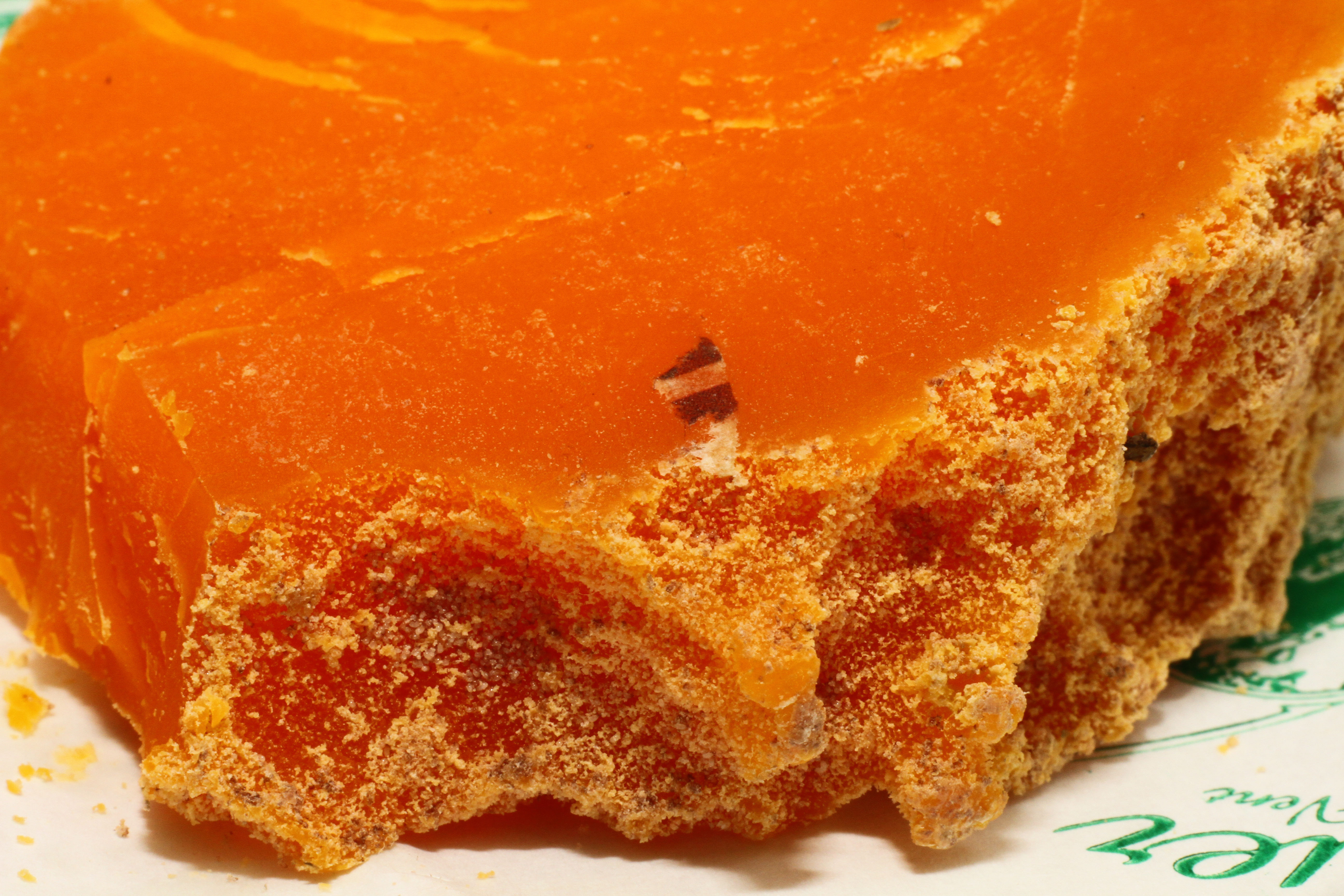 Mimolette